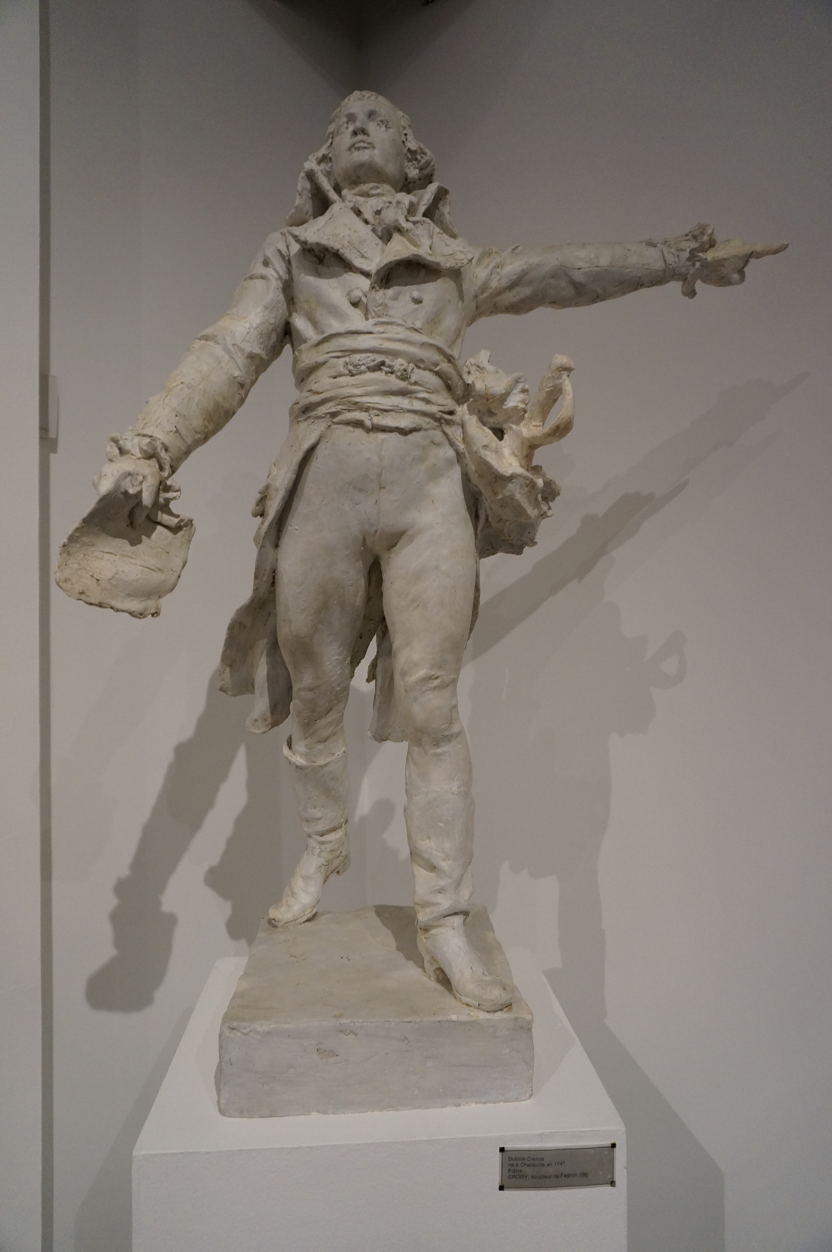 sculpture au Musée de l'Ardenne .